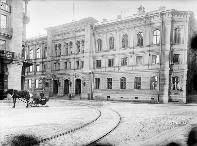 Postkontoret vid Rödbodtorget, exteriör av byggnaden Foto Nyckelord Plats: Kvarteret SJÖRÅEN. Jakobsgatan 30. Rödbodtorget. Vasastaden. Tid: 1899 - 1905 Ämne: Postkontor. Referenser Upphov: Okänd. Tid: 1899 - 1905 Beteckning: Fotonummer E 9186